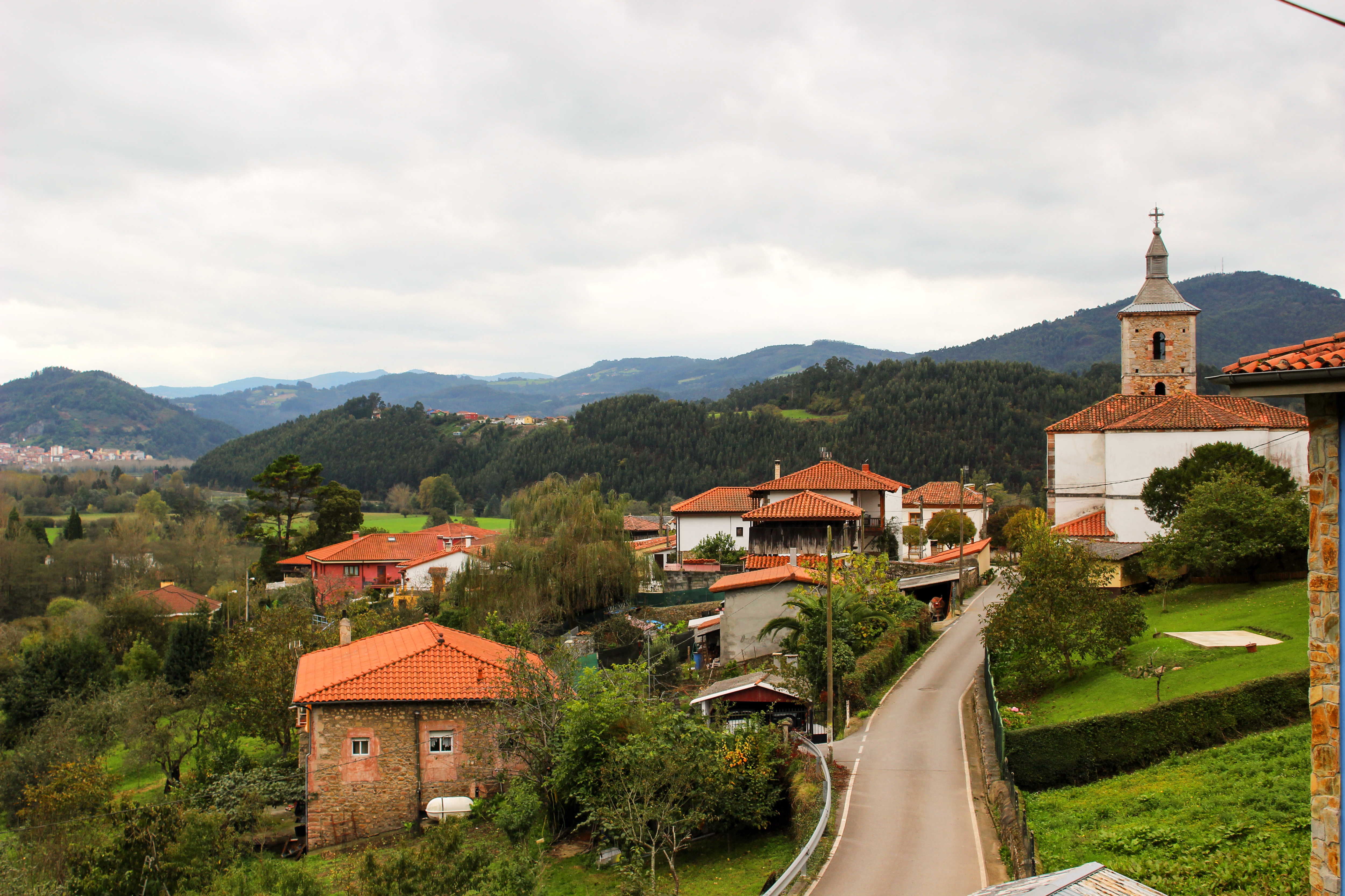 Riberas (Soto del Barco, Asturias)